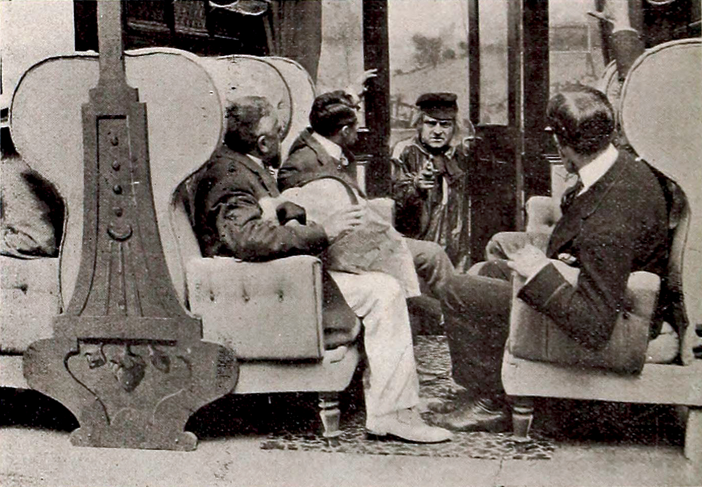 Still from Zigomar